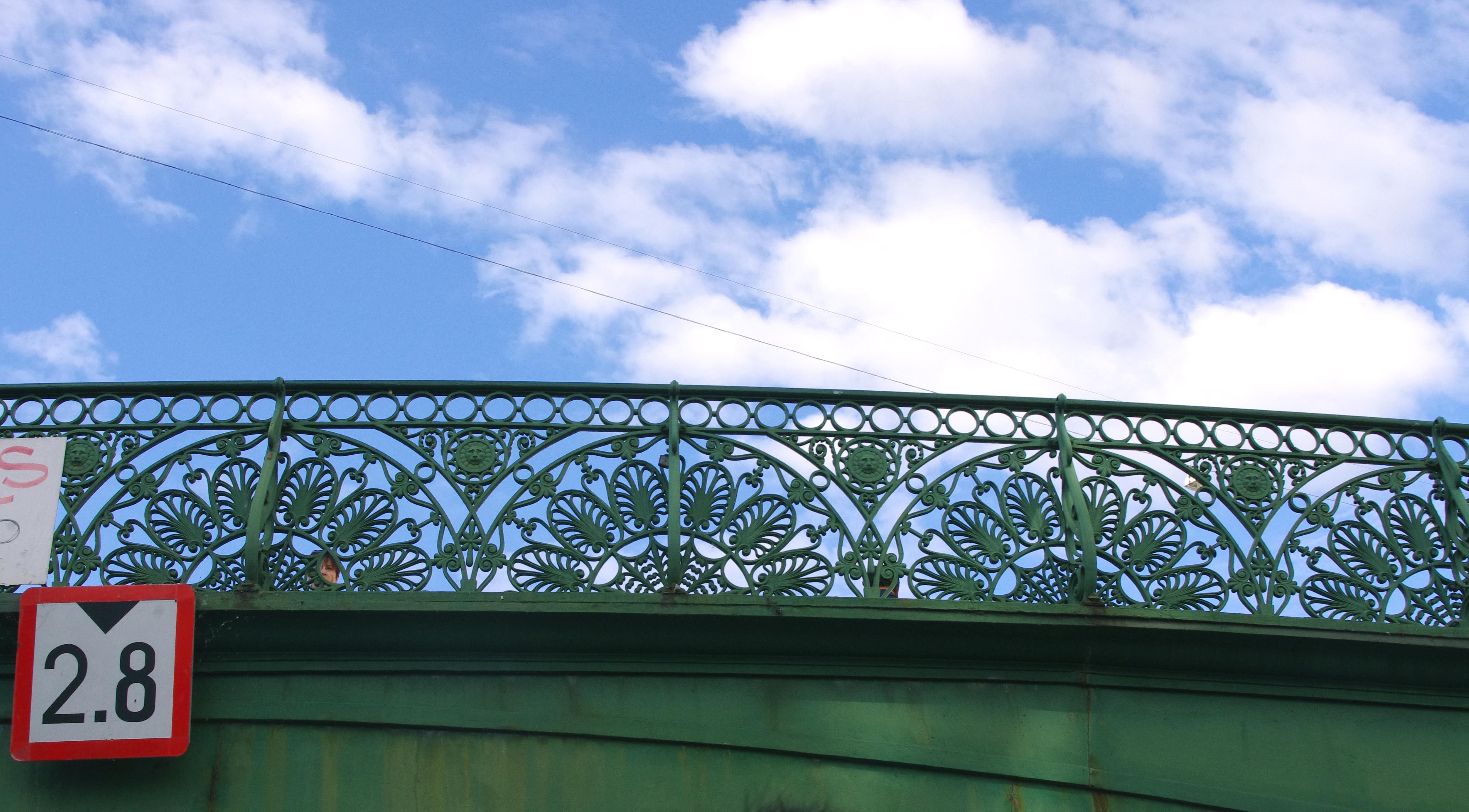 Мост Полицейский (Зеленый, Народный) (Санкт-Петербург и Лен.область, Санкт-Петербург, через р. Мойку по Невскому проспект)